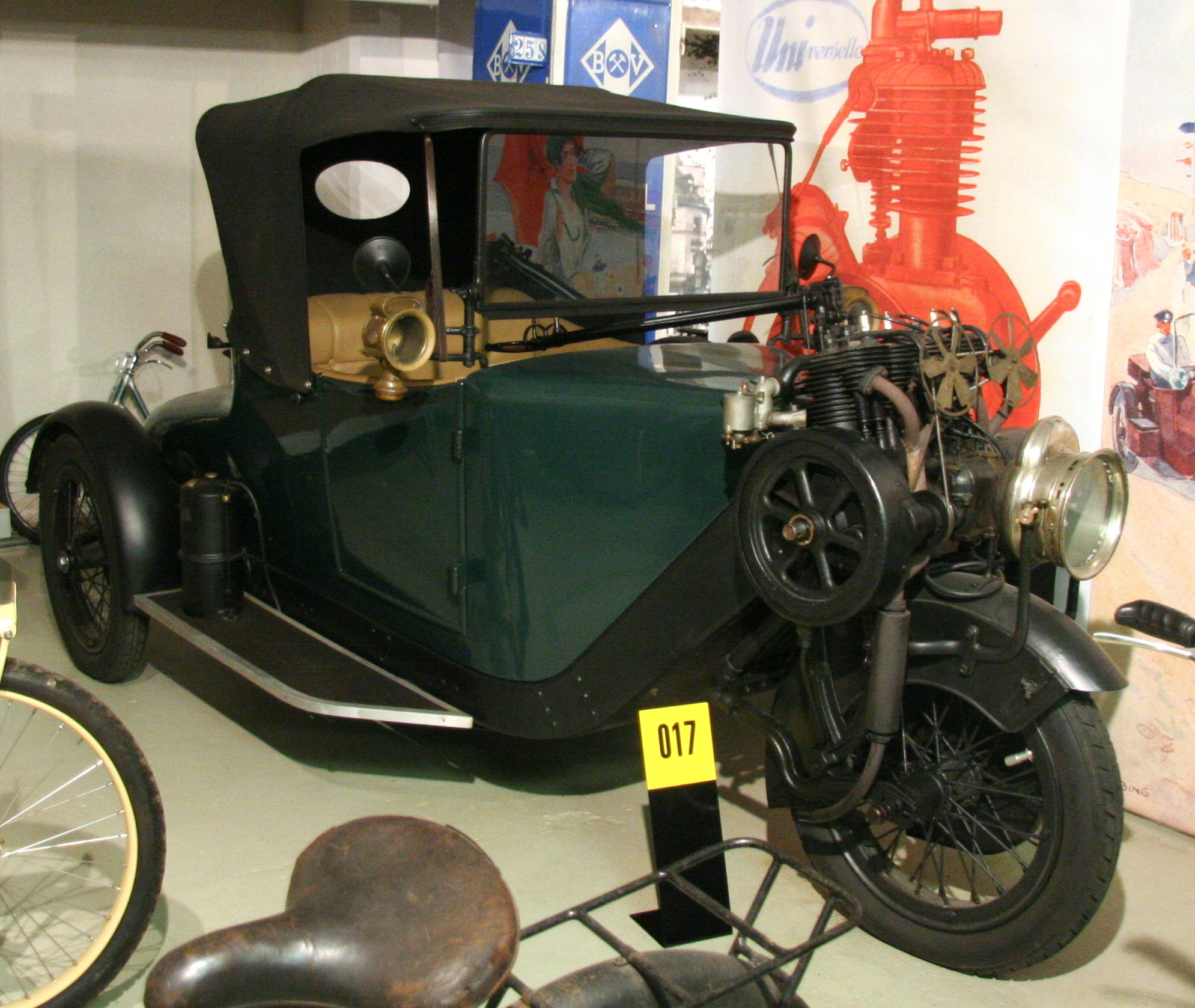 Phänomobil Zn, 4-Zylinder Motor, 12 PS, 1548 cm³, Höchstgeschwindigkeit 65 km/h, Gewicht 570 kg, Baujahr 1921 im Museum für sächsische Fahrzeuge in Chemnitz.